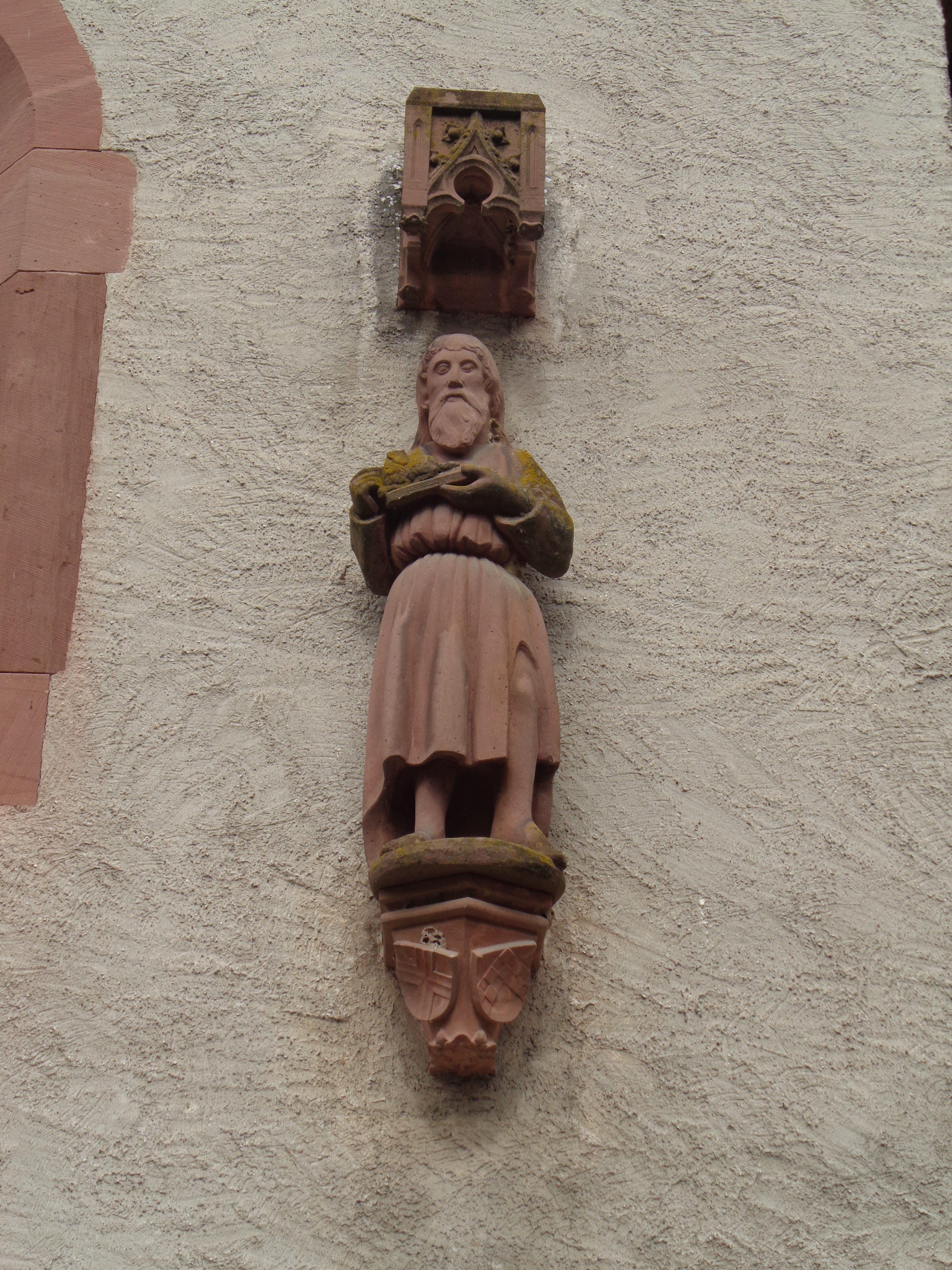 Johannesstatue an der Eingangsseite (Südseite) der Johanniterkapelle in Rheinfelden AG mit dem Wappen von Johannes Loesel, in dessen Amtszeit die Kapelle errichtet wurde